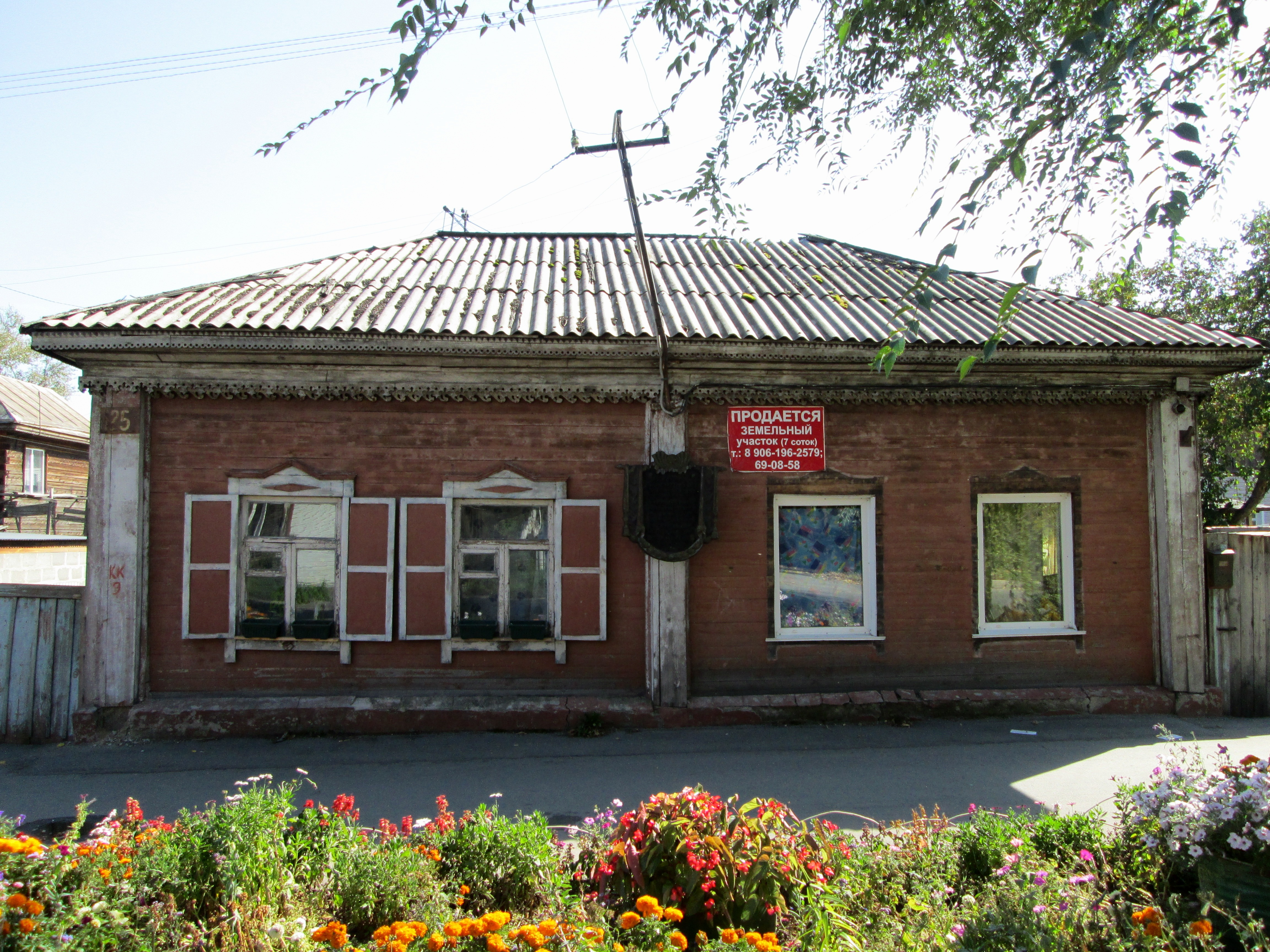 Дом, в котором в 1920—1921 гг. жил и умер Ворожцов Матвей (по партийной кличке «Анатолий»), командир 1-й Чумышской кавалерийской дивизии красных партизан и организатор большевистского подполья г. Барнаула: улица Анатолия, 125, Барнаул, Алтайский край